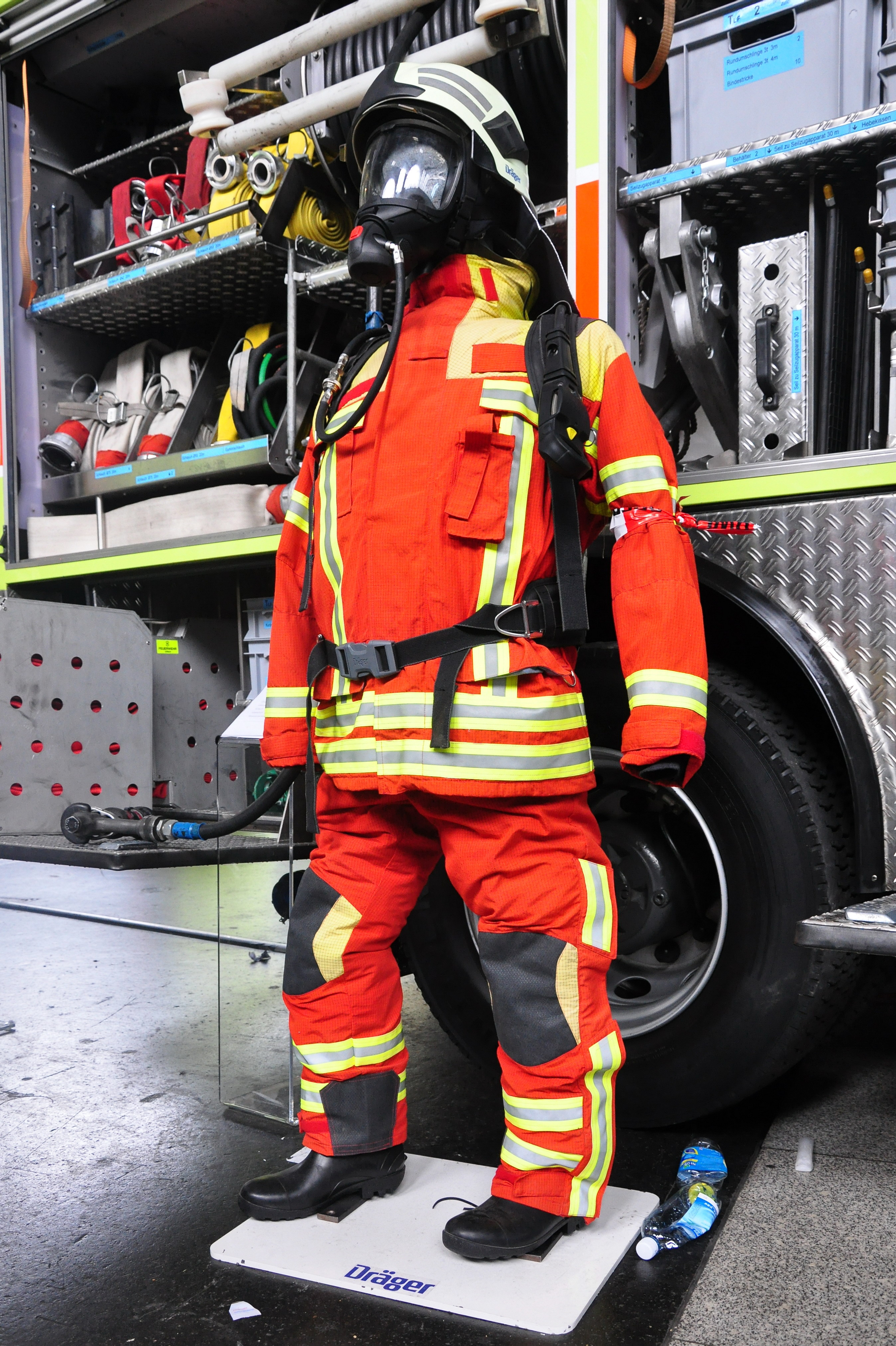 10 Jahre SRZ Jubiläumsanlass (13. und 14. Mai 2011) von Schutz & Rettung in der Haupthalle des Hauptbahnhofs in Zürich (Switzerland)